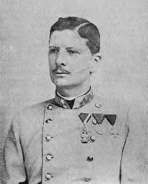 Rudolf Brudermann (-1905)